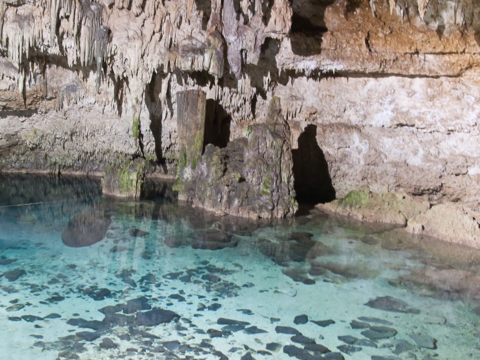 Cenote de Choo-Ha. Cobá, Quintana de Roo, México